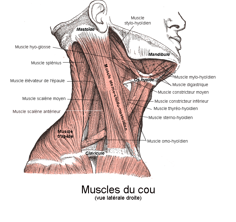 Muscles du cou. Vue latérale droite. Anatomie humaine.